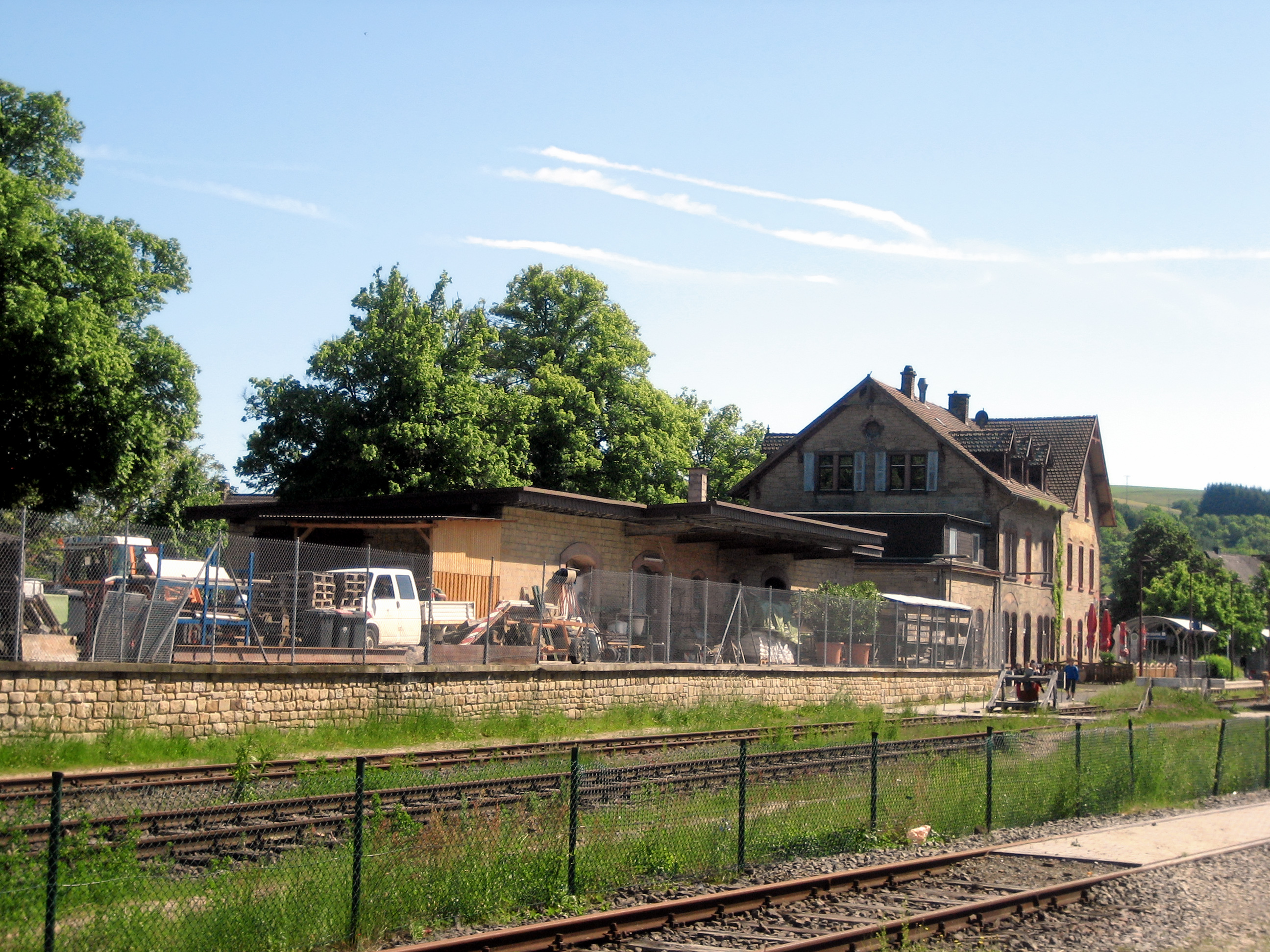 Bahnhof Lauterecken-Grumbach im Jahr 2013